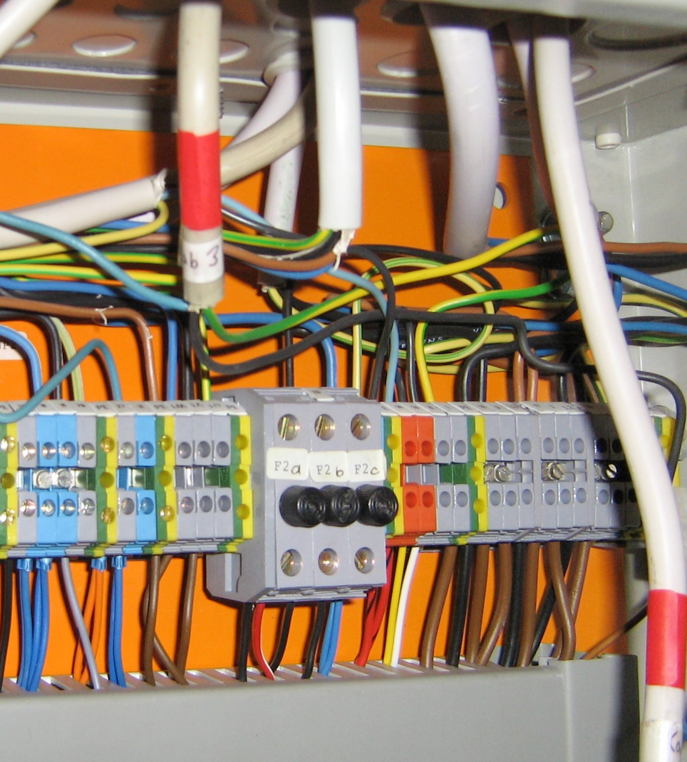 Klemmleiste